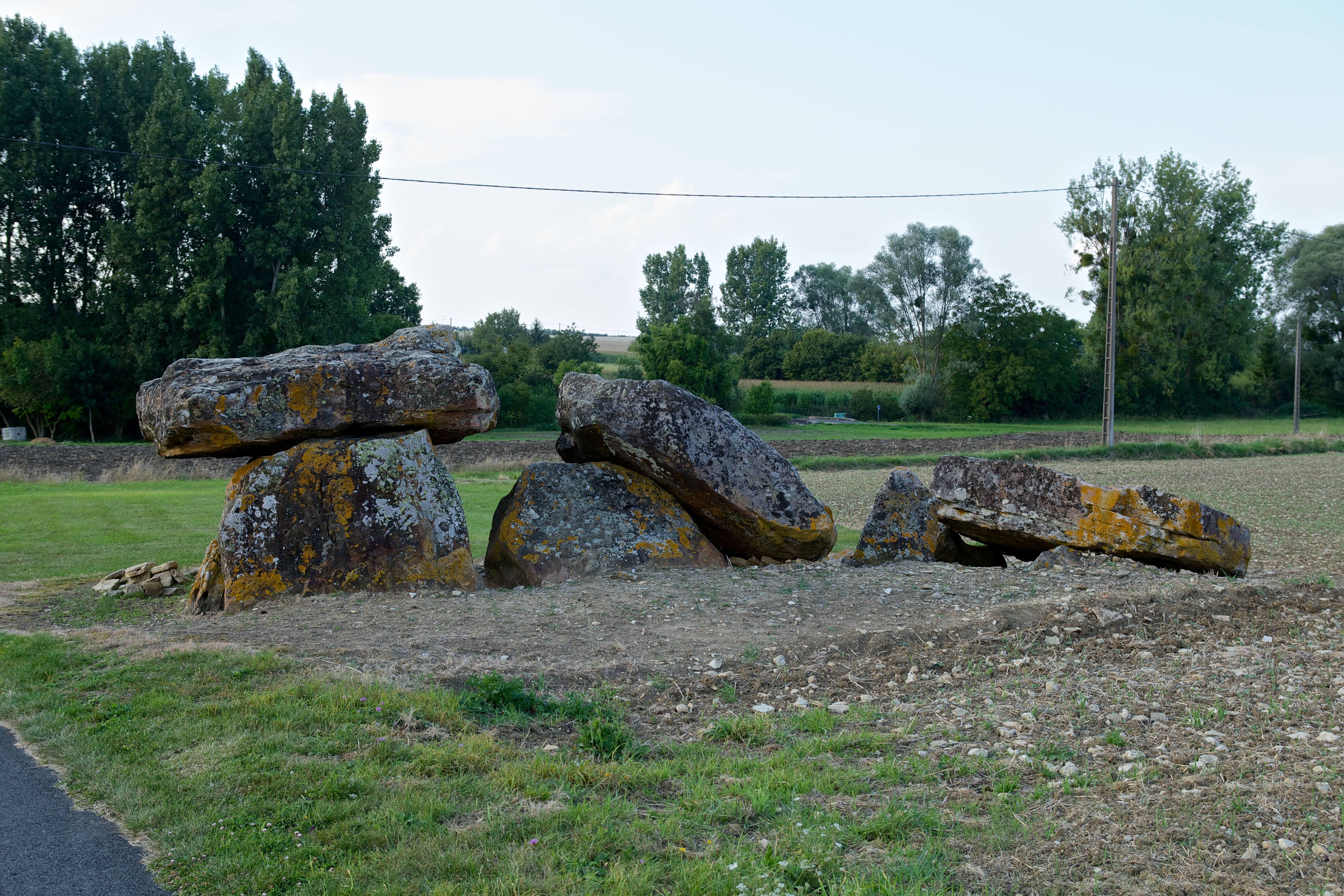 Vue Nord